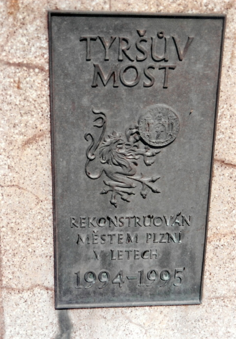 Pamětní deska na poslední rekonstrukci Tyršova mostu. Červenec 2006